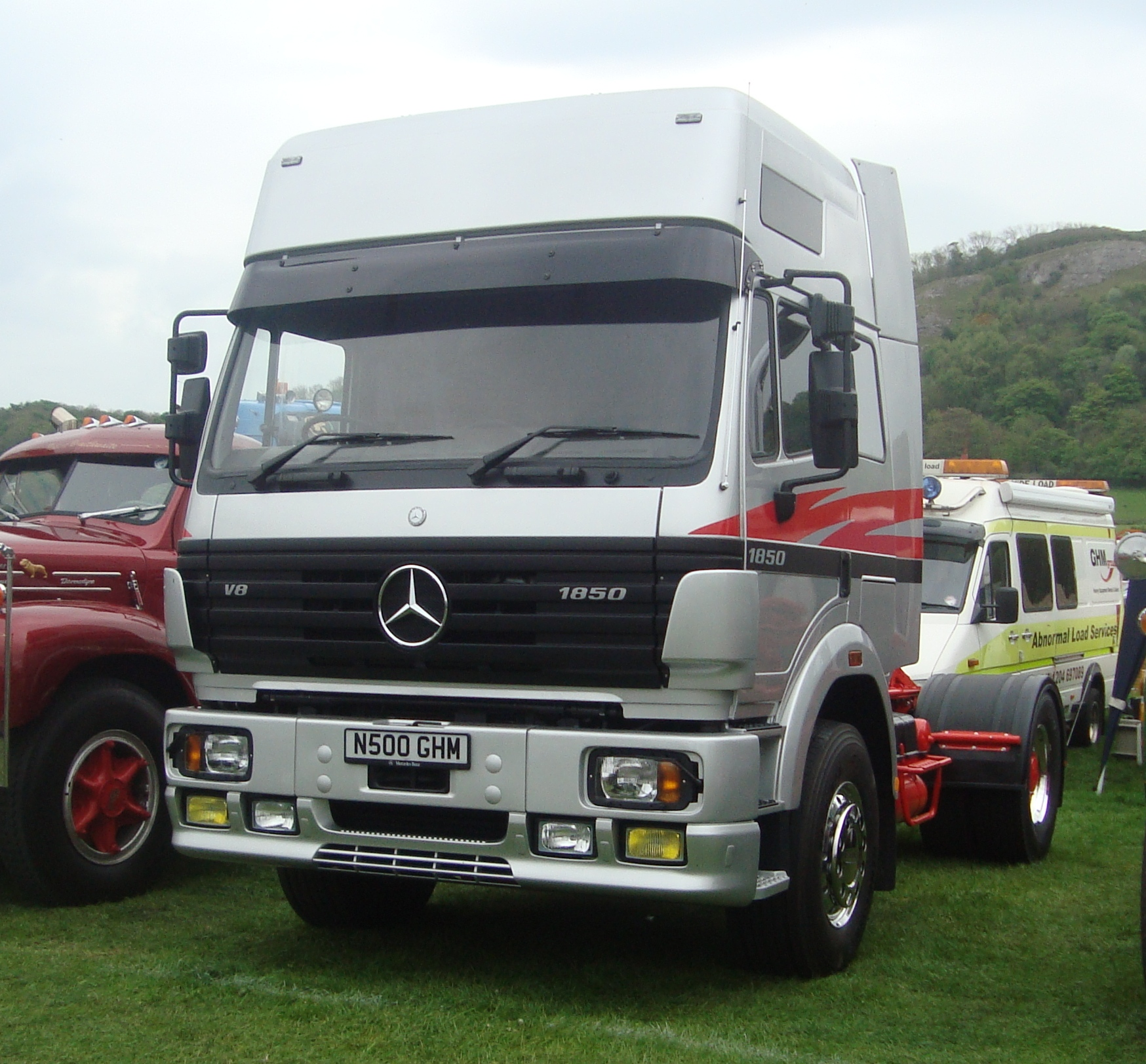 Mercedes Lorry